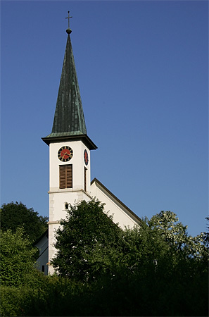 Katholische Kirche in Ettingen, Kanton Basel-Landschaft